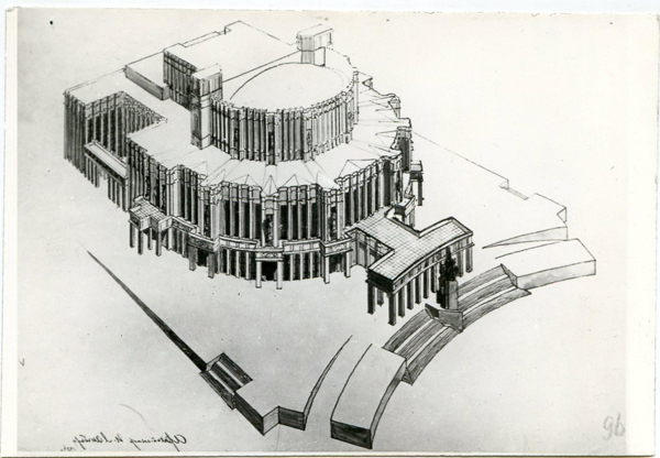 Театр оперы и балета в Минске. Проект. Аксонометрия